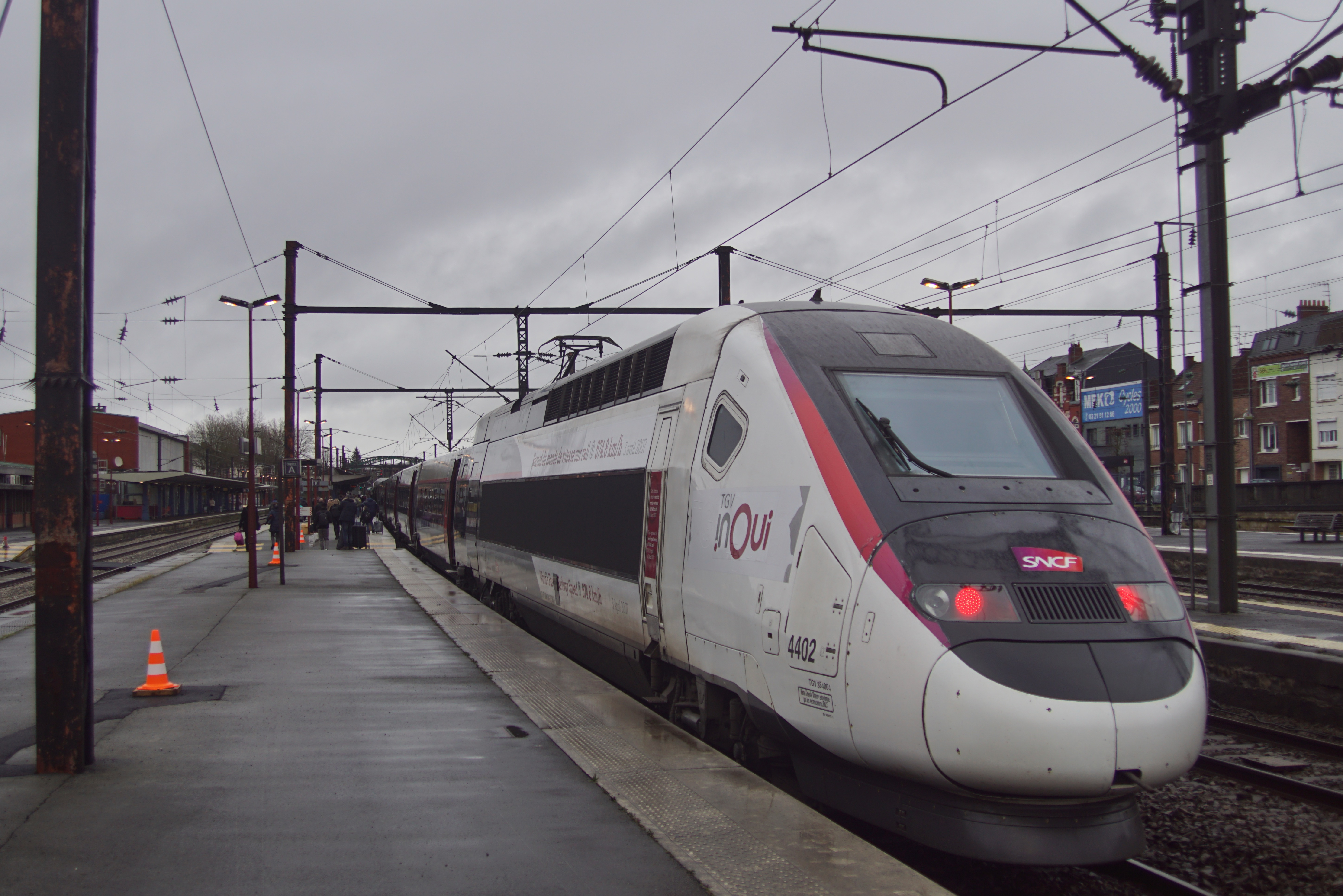 En gare d'Arras, le TGV POS du record mondial de la vitesse des TGV, qui a pour destination finale Lille-Europe. Sa série est un tout nouveau matériel sur le réseau Nord depuis le service annuel 2020 (appliqué mi-décembre comme d'habitude) ayant entraîné la radiation des TGV PSE.